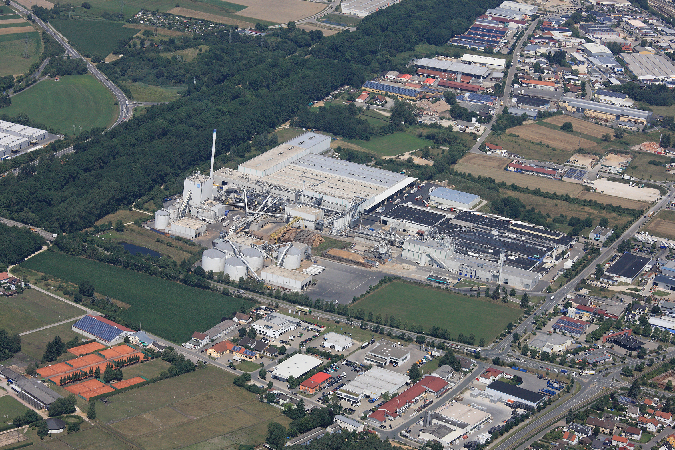 Luftaufnahme Pfleiderer Neumarkt